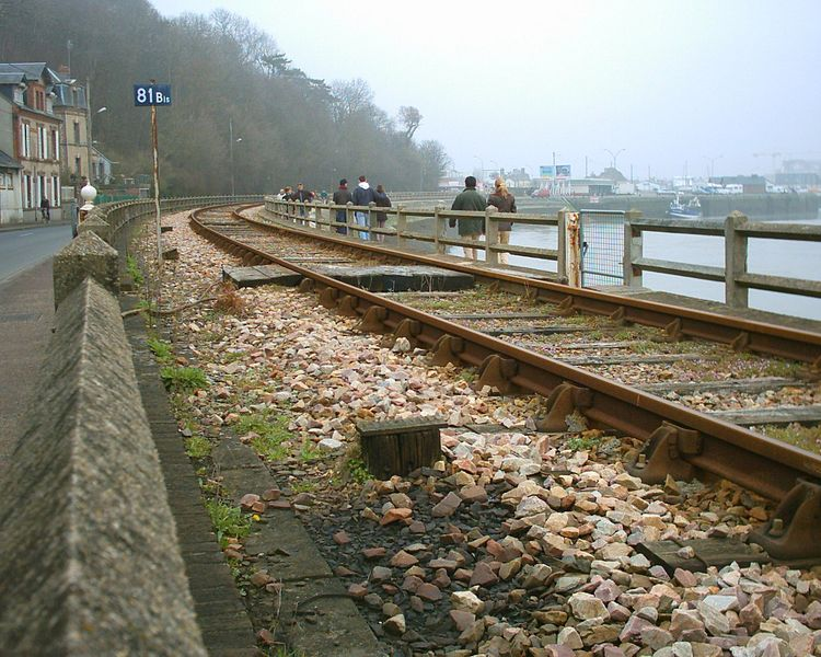 Digue de Houlgate, Houlgate in 2005.